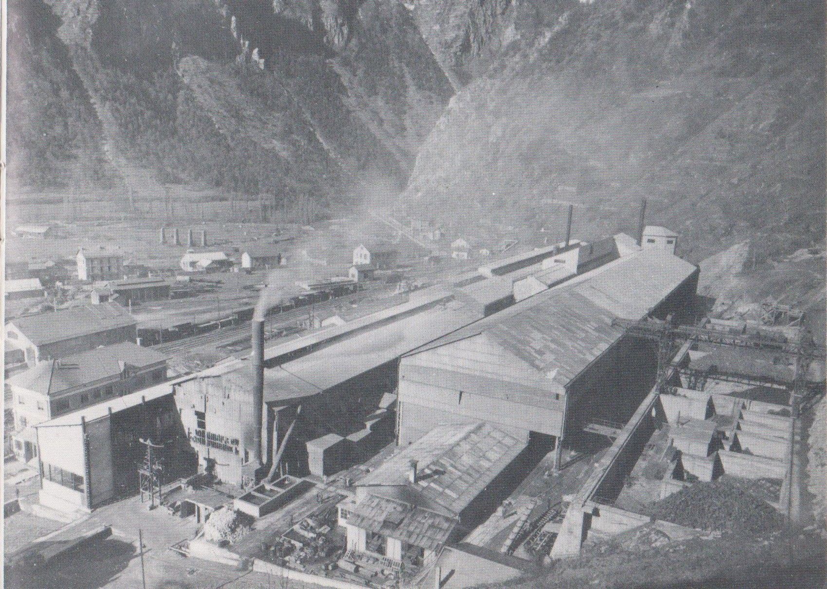 L'aciérie de Moutiers, étagée sur 5 niveaux